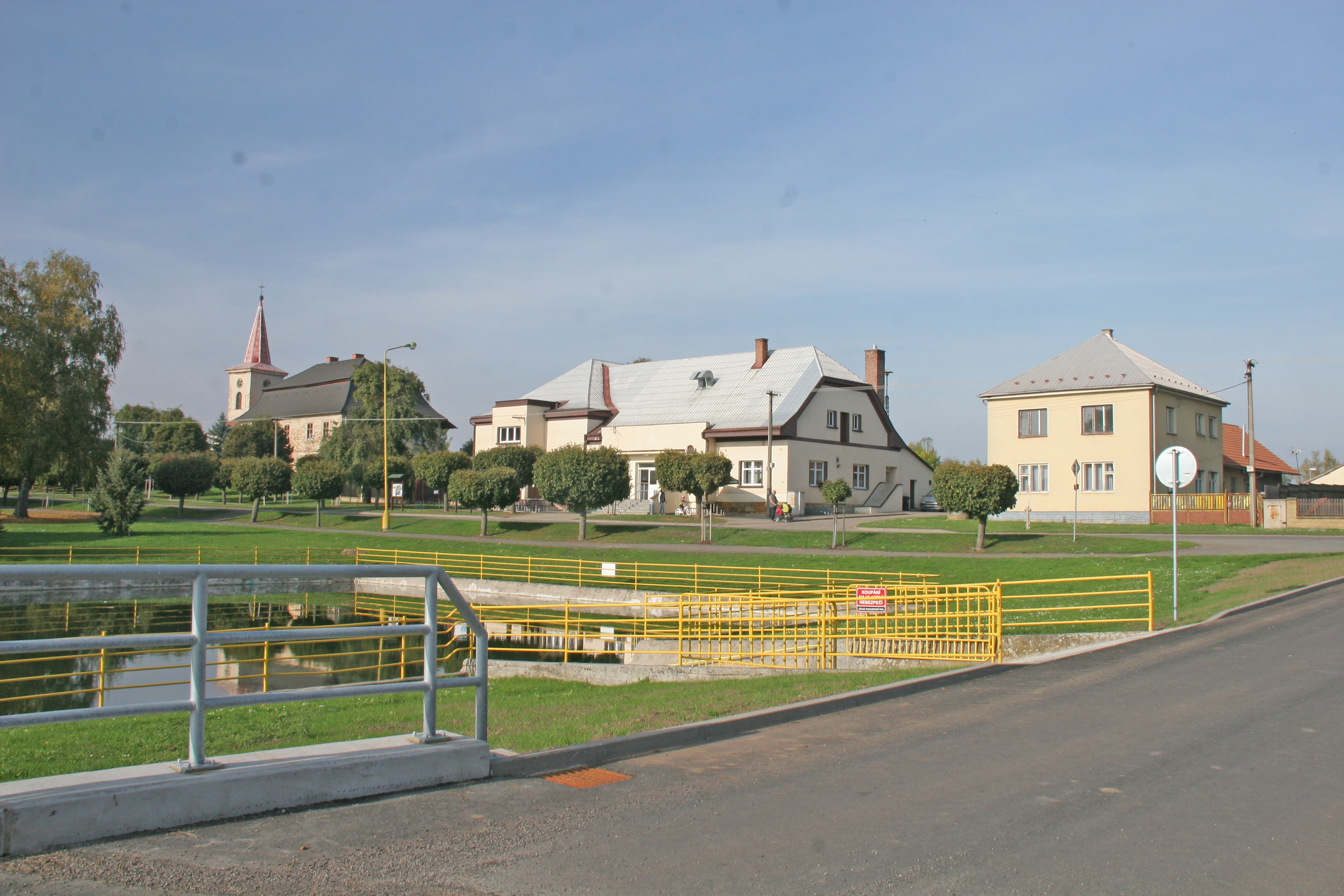 Lužec nad Cidlinou náves